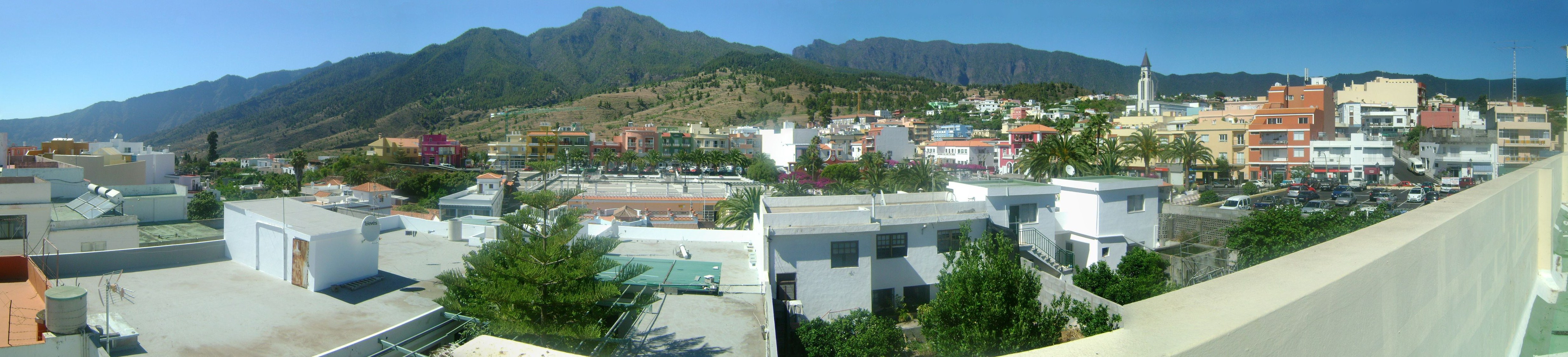 Vista de El Paso desde la azotea del San Martín